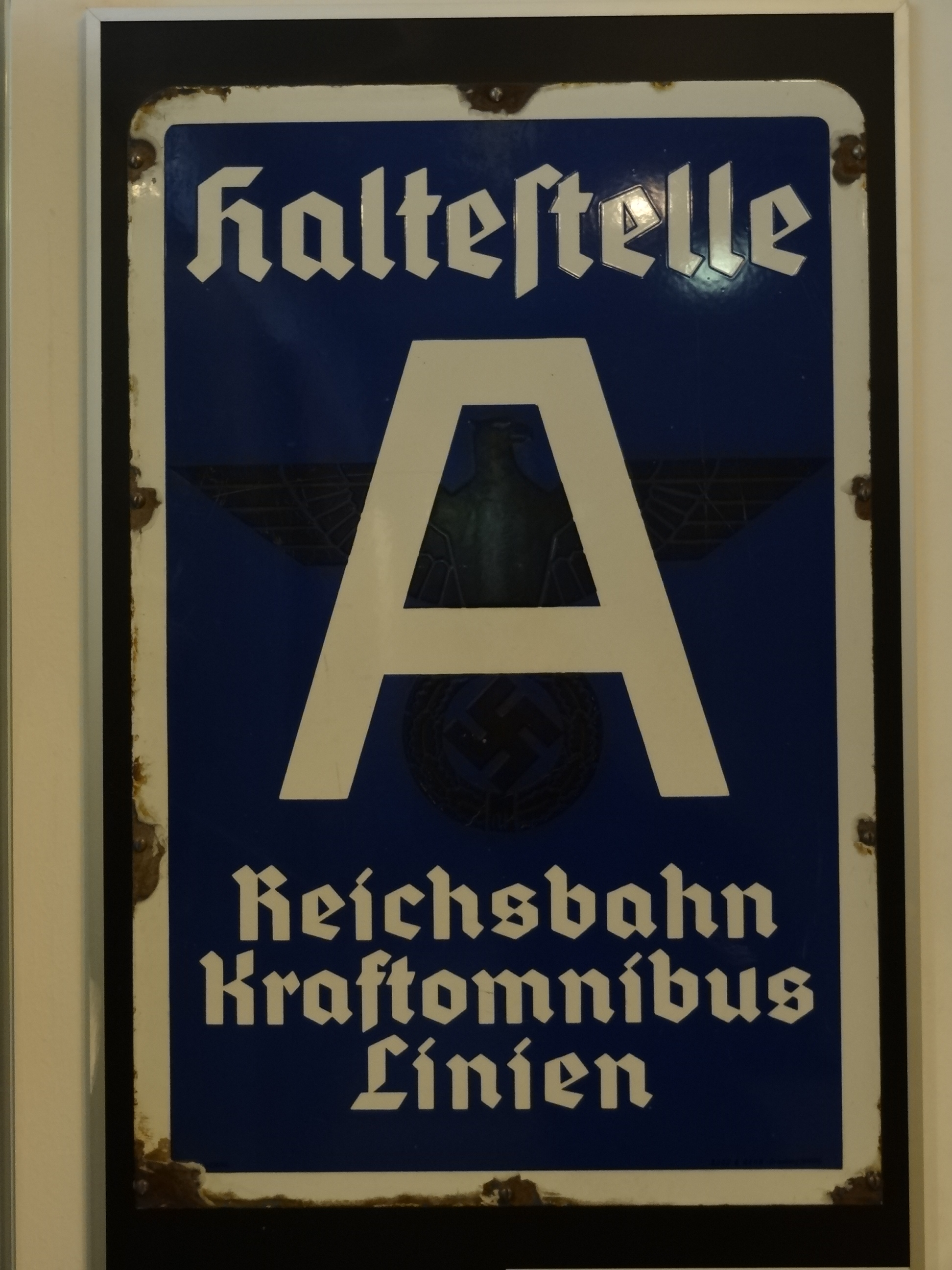 Haltestelle Reichsbahn Kraftomnibus Linien